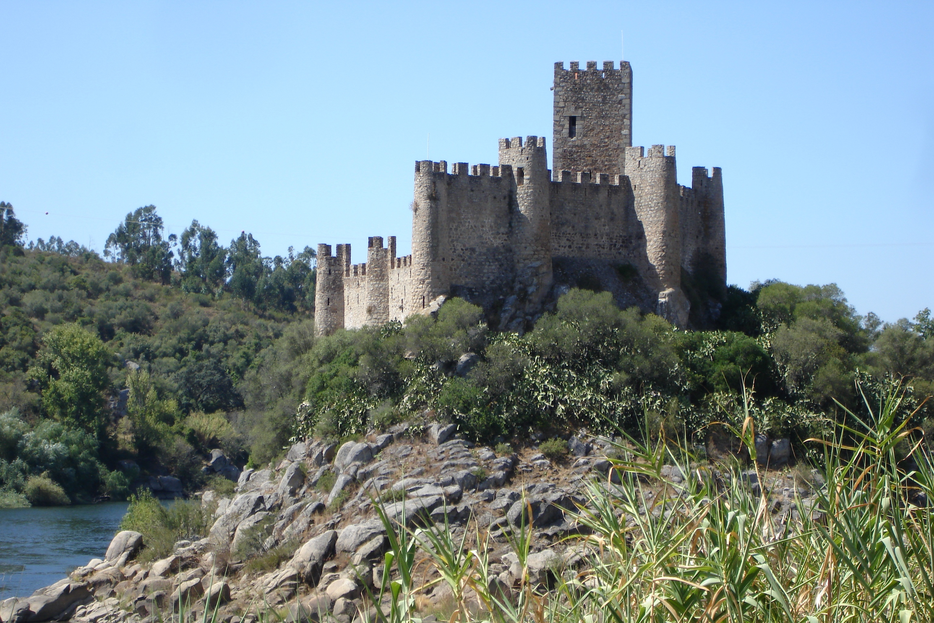 Castelo de Almourol, Vila Nova da Barquinha, Santarém, Portugal.